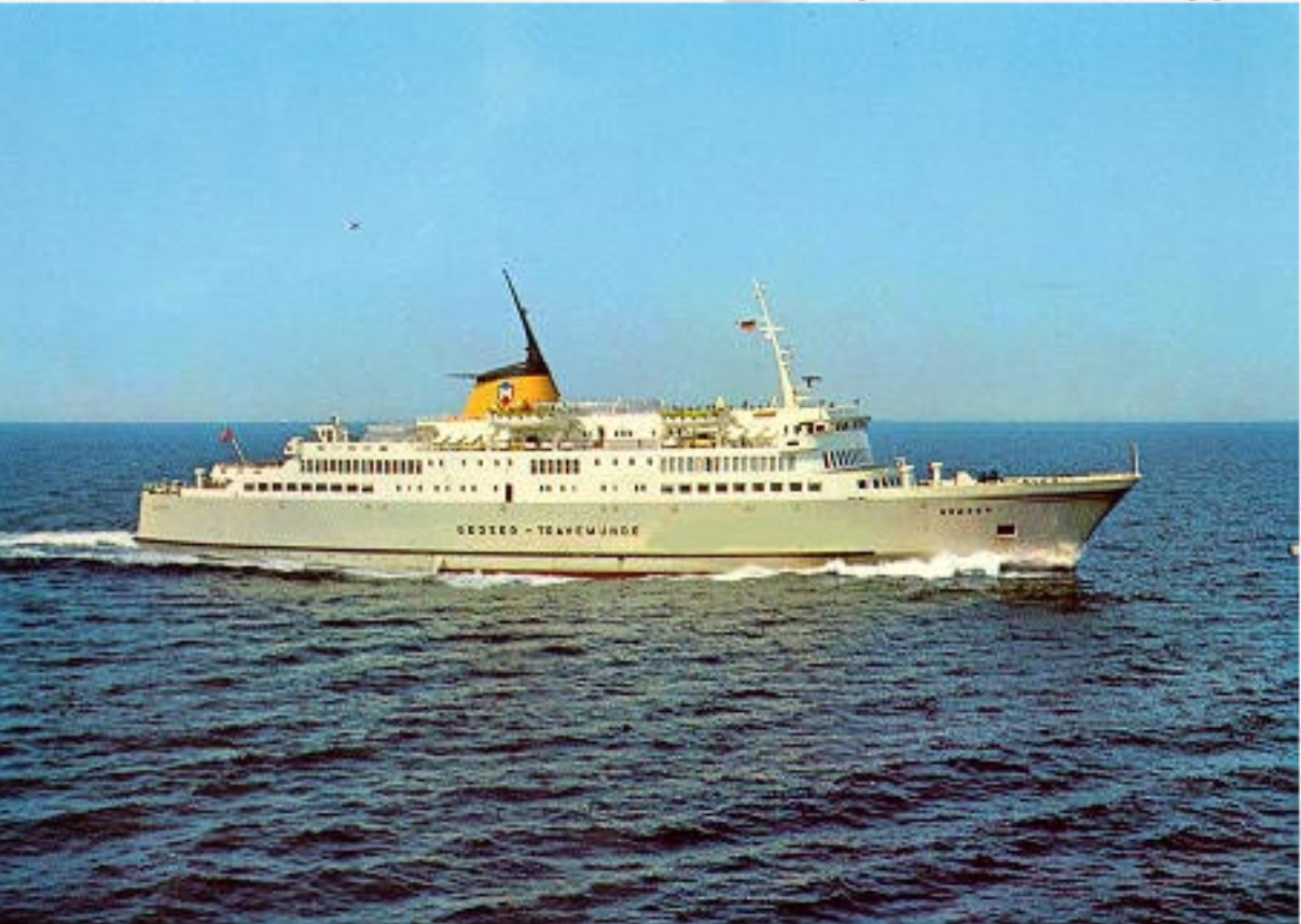 FS Gedser (II) auf der Gedser-Travemünde-Route, Reederei Moltzau, Gedser/Dänemark IMO Number: 6803246 MMSI Number: ---- Callsign: OWBC Length: 115 m Beam: 18 m